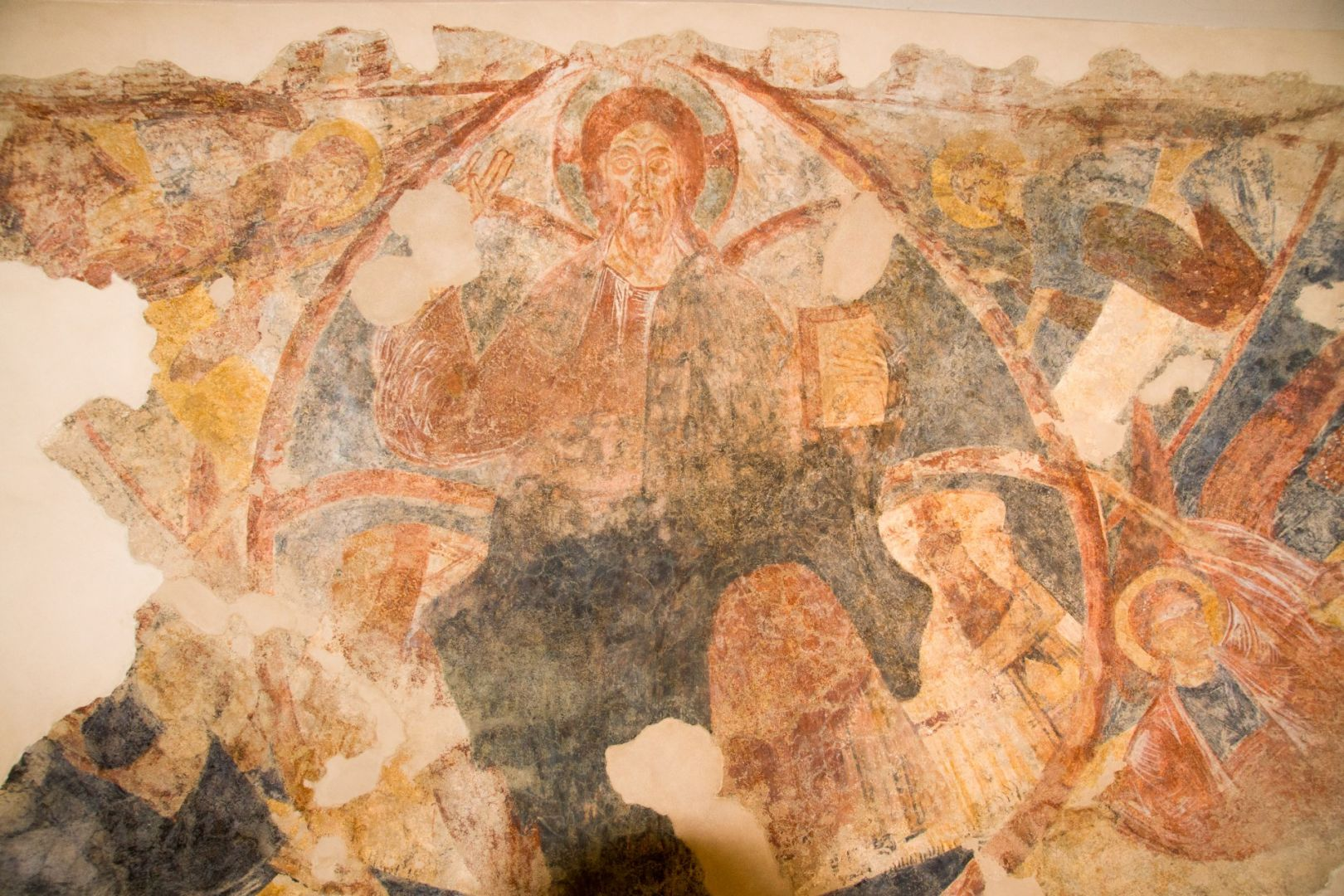 Il Cristo Pantocratore nella viscisa piscis, sorretta da quattro angeli